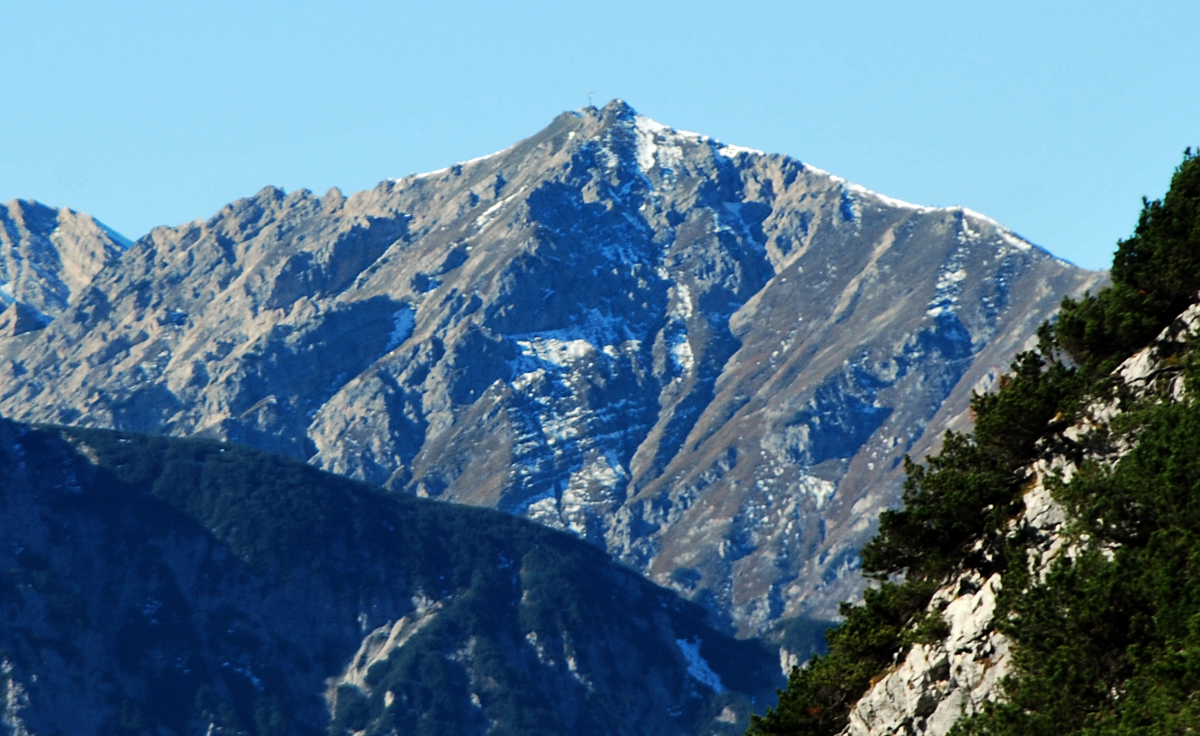 Seefelder Spitze from NE